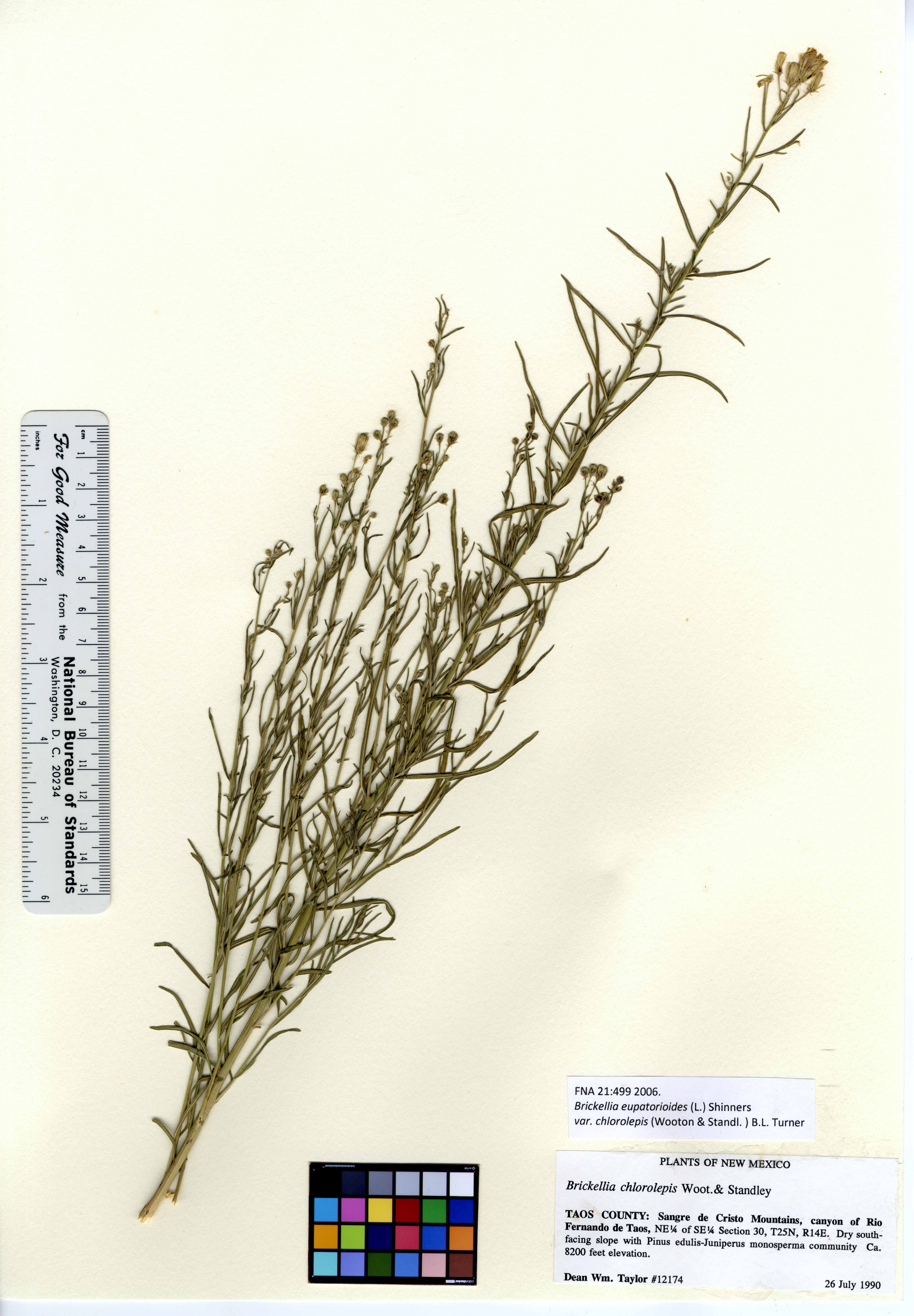 Brickellia eupatorioides var. chlorolepis